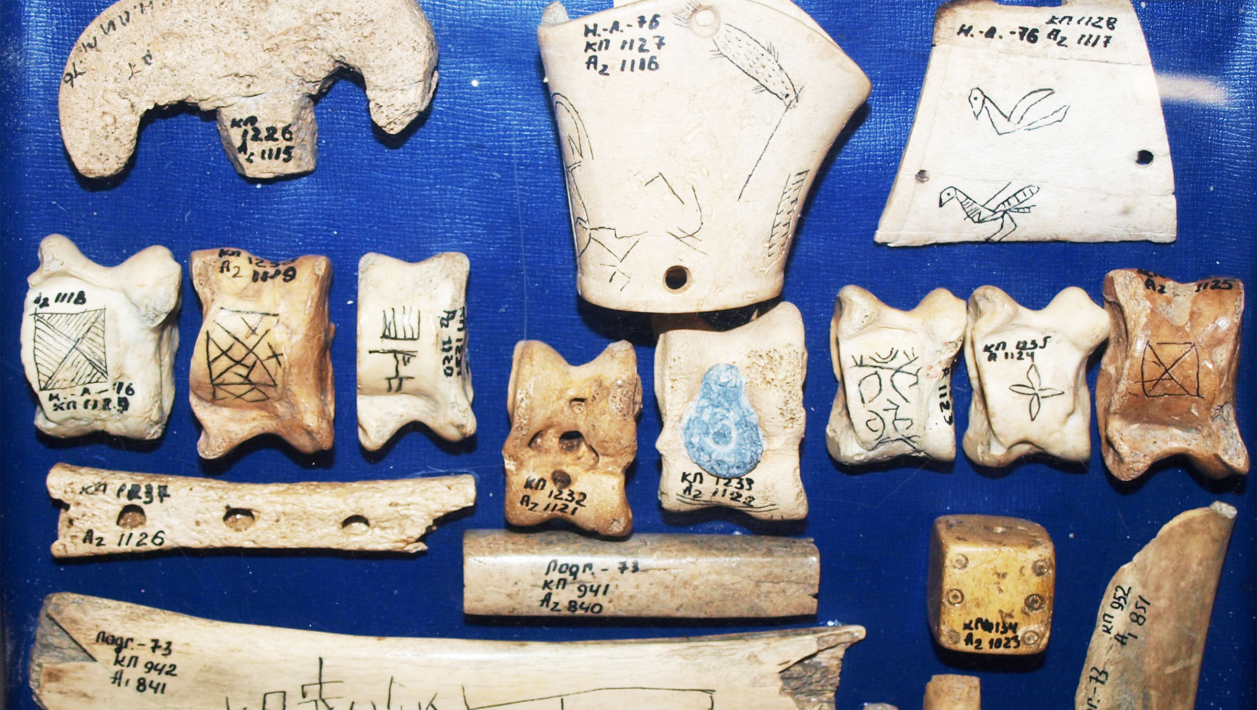 Астрагали. Україна, V-X сторіччя